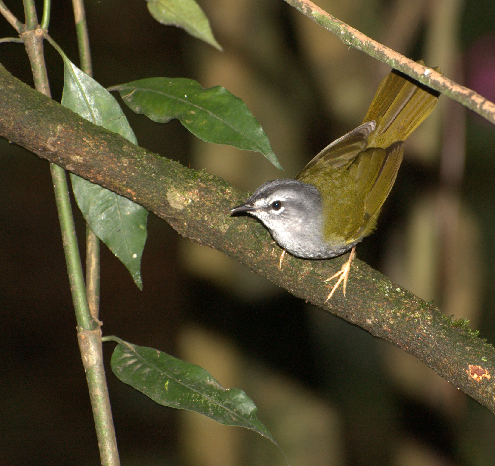 White-browed Warbler (Myiothlypis leucoblephara) Parque Estadual da Serra da Cantareira - São Paulo-SP